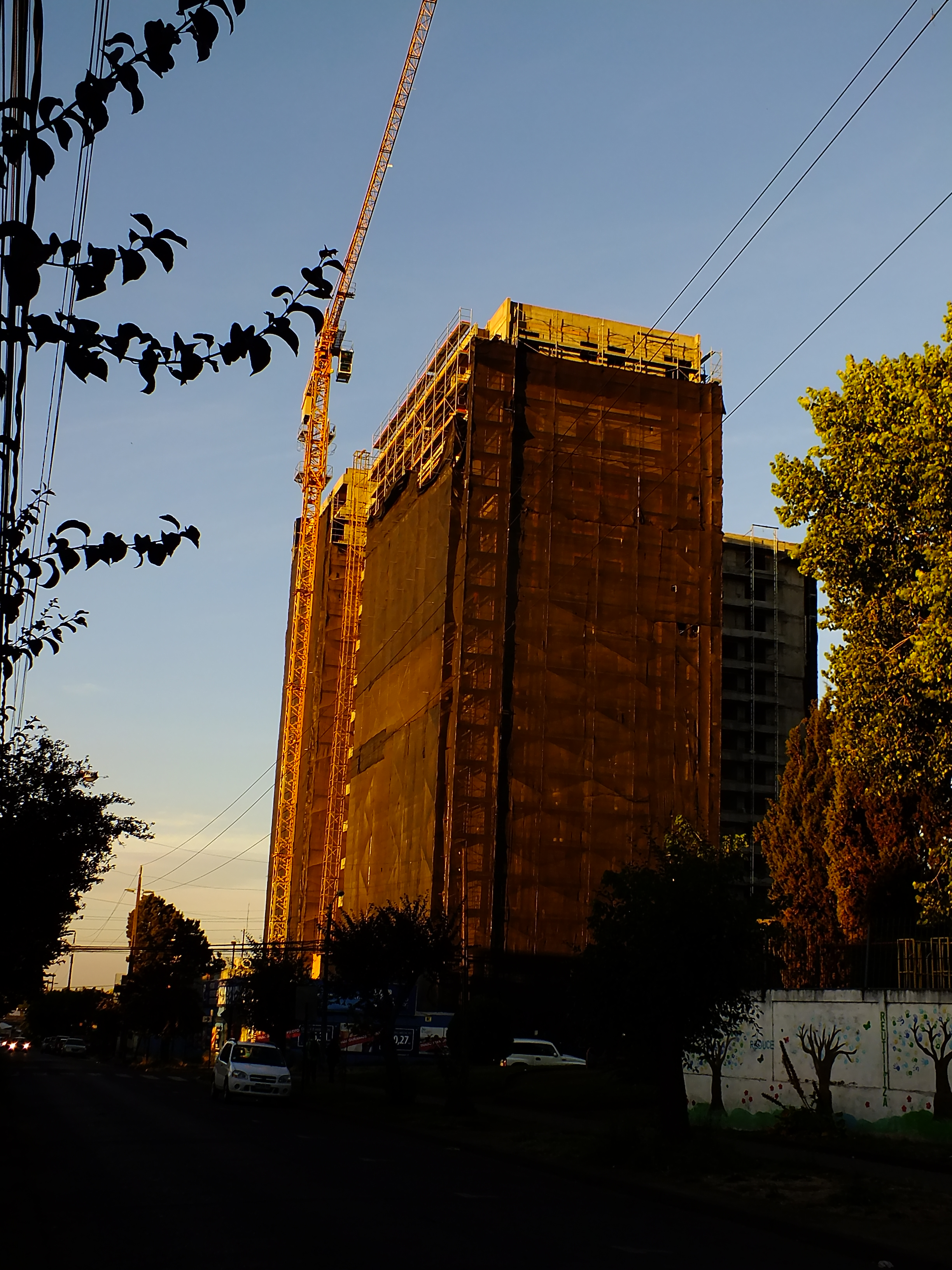 Torre de 17 pisos, ubicada en calle Jose Manso de Velasco esquina Juan Antonio Coloma.